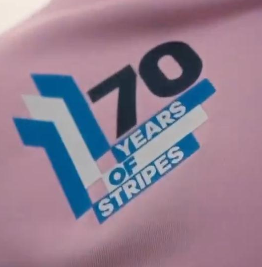 Logo de la campaña 70 years of stripes de adidas en la camiseta alternativa 2020 de Millonarios Fútbol Club